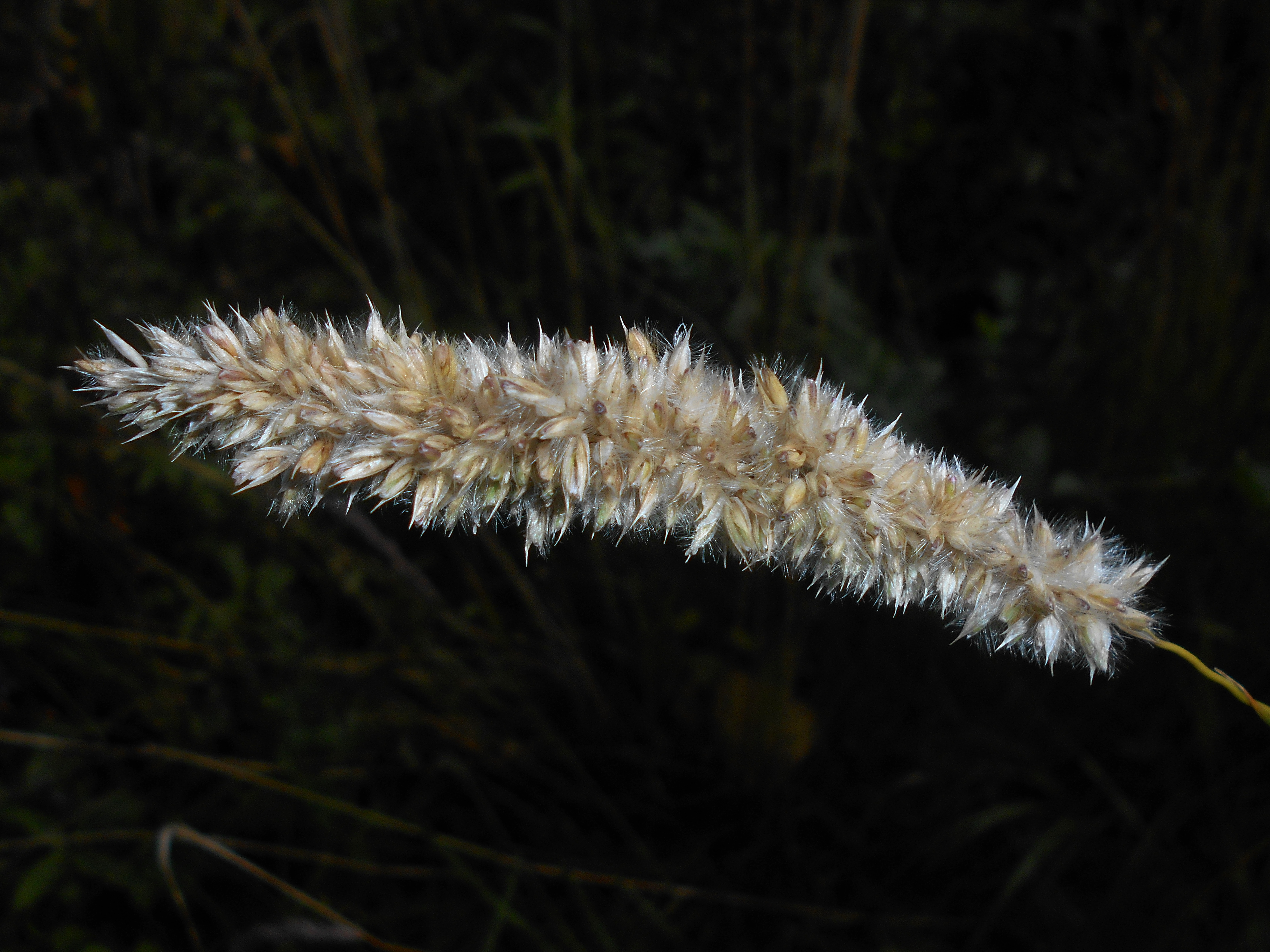 Perłówka siedmiogrodzka (Melica transsilvanica), Ogród Botaniczny UMCS w Lublinie.